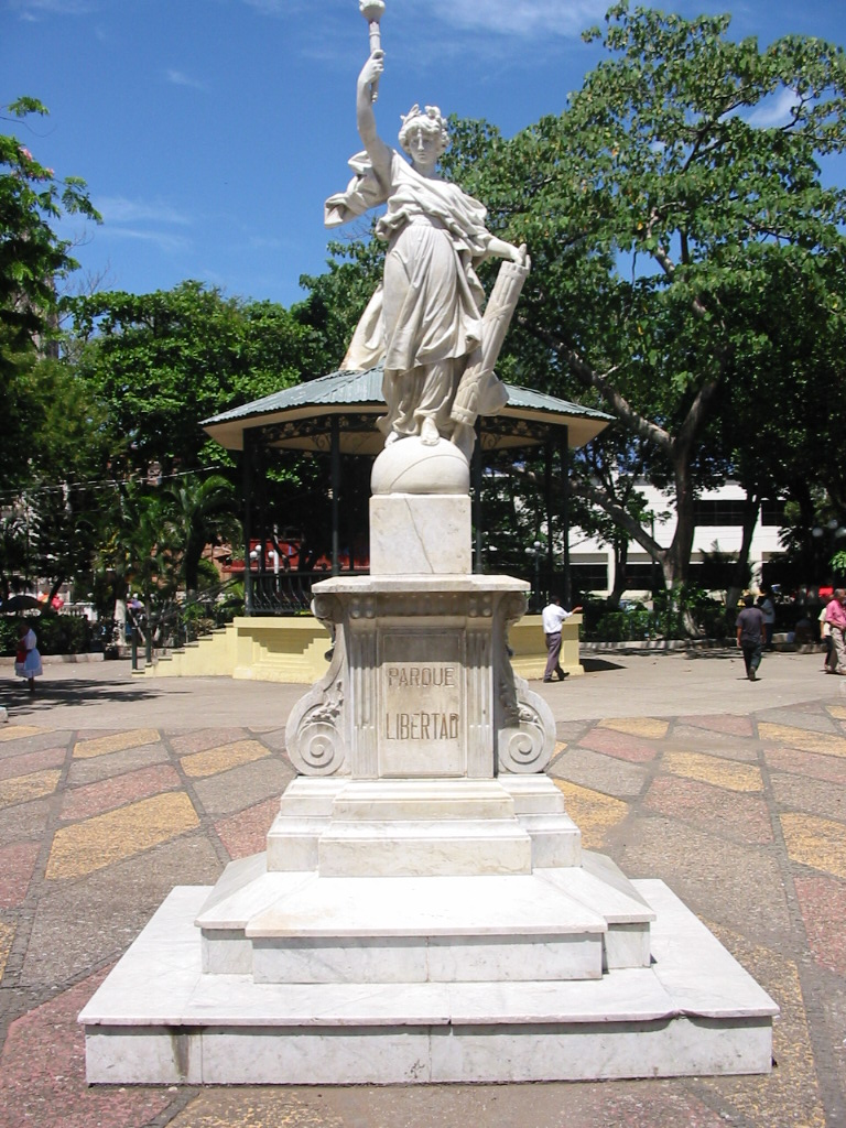 Monumento a la libertad ubicado en el parque del mismo nombre de la ciudad salvadoreña de Santa Ana, El Salvador.